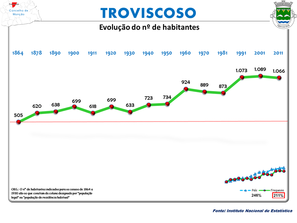 Censos 1864/2011